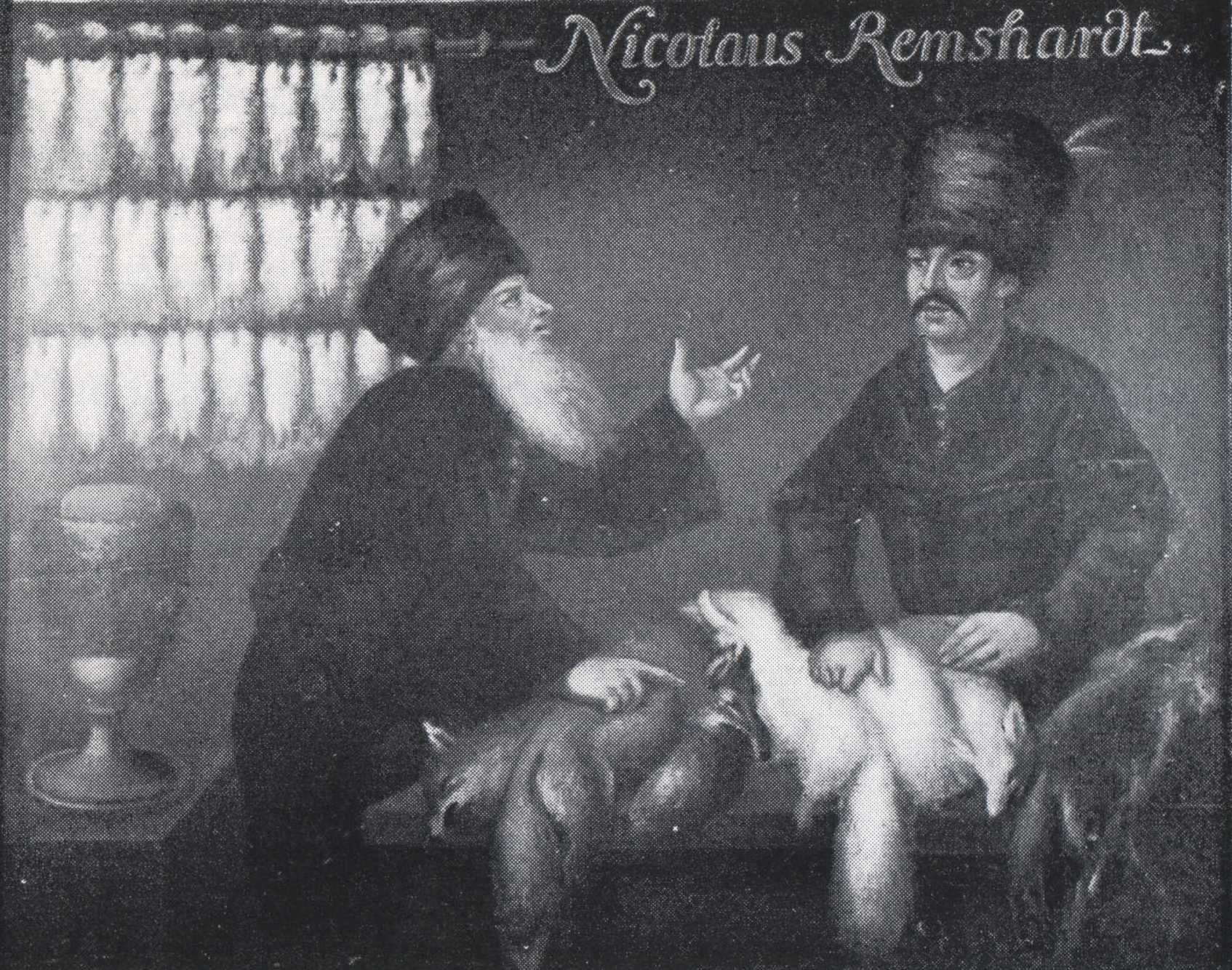 Firmenschild des Kürschners Nicolaus Remshardt aus Göppingen. Das Schild wurde von dem Kürschner mit dem Pferdewagen zu den Leipziger Messen mitgenommen und dort am Messestand angebracht. Die Abbildung zeigt einen sibirschen Pelztierjäger in Verhandlung mit einem russischen Rauchwarenhändler. Im Hintergrund ein Fellfutter aus Fehwammen. Aus: Geschichte des Kürschnerhandwerks in Württemberg: Das Kürschnergeschlecht Remshardt erscheint schon 1760 in den Göppinger Steuerbüchern. 1829 wird dort Nicolaus Remshardt als Rauchwarenhändler genannt. Nach einem Bericht von 1839 über das württ. Kürschnergewerbe soll sein Geschäft „zu einem der bedeutendsten in Deutschland gehören“. 1867 verlegte ein Nachkomme das elterliche Geschäft nach Stuttgart in die Eberhardtstraße 27. Der letzte Geschäftsinhaber, Karl Remshardt, 1839-1920, wurde über die Kreise seines Berufs hinaus als humorvoller Mundartdichter bekannt.